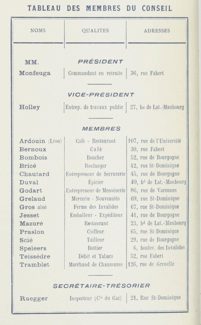 Tableau des membres du Comité des fêtes du quartier des Invalides en 1903.